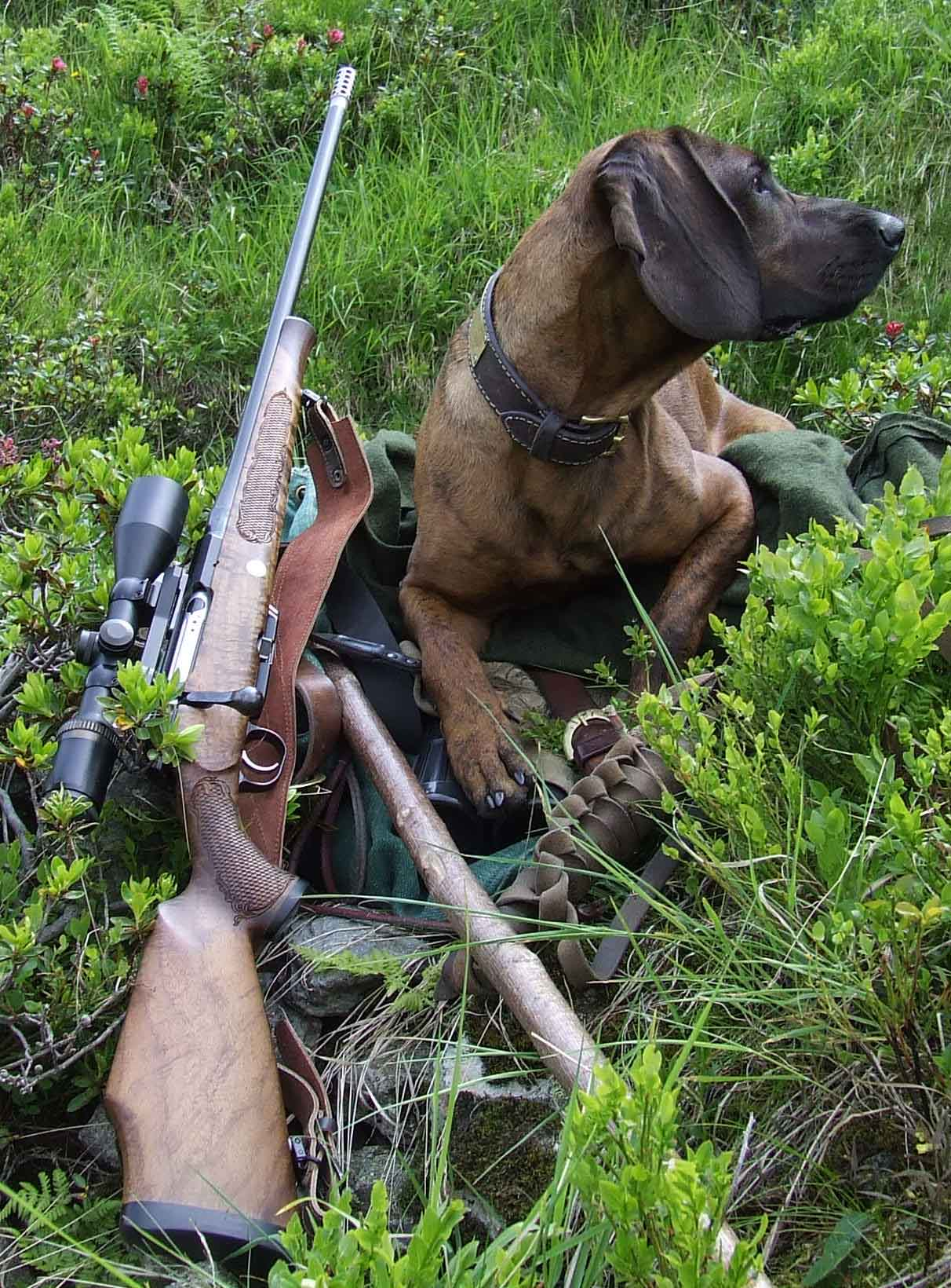 Hannoversche Schweisshündin in den Kitzbüheler Alpen mit Voere LBW-D Carbon nach erfolgreicher Pirsch auf Hirsch.